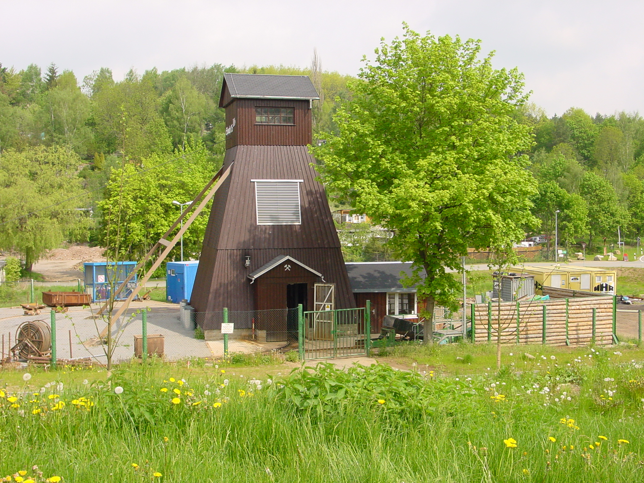 Förderturm Schacht 15 IIb in Bad Schlema 15.05.2004 foto by geme